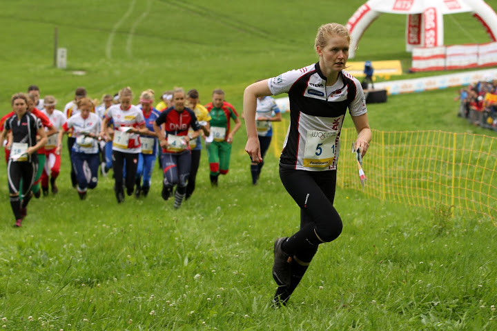 VM Stafet 2012, Emma Kligenberg